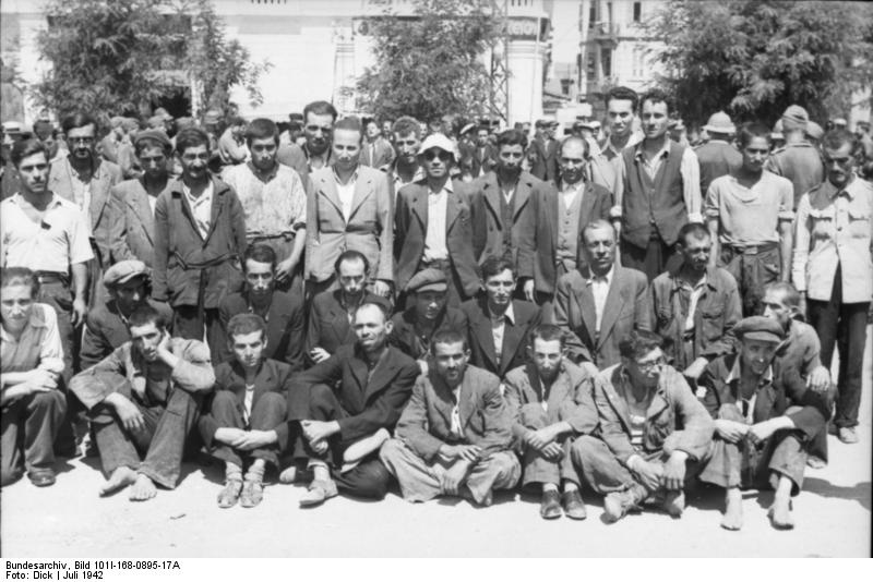 Scherl; Griechenland: In Übereinstimmung zwischen den deutschen und griechischen Stellen werden jetzt die Juden in Griechenland erfasst und einer nutzbringenden Arbeit zugeführt. Kriegsberichter Dick, Juli 1942